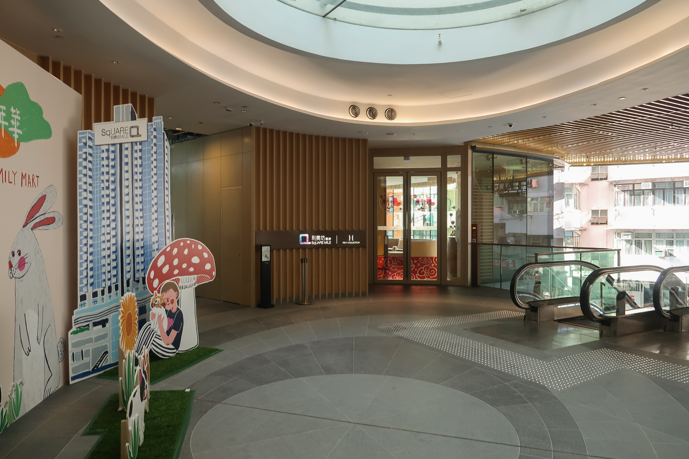 Eltanin Square Mila Entrance